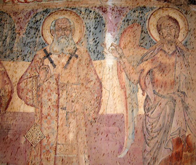 Стенопис от църквата "Света Богородица" в Поздивища, Ном Костур, Гърция.